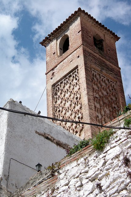 Alminar mudejar de la Parroquia de Santa Ana de Salares